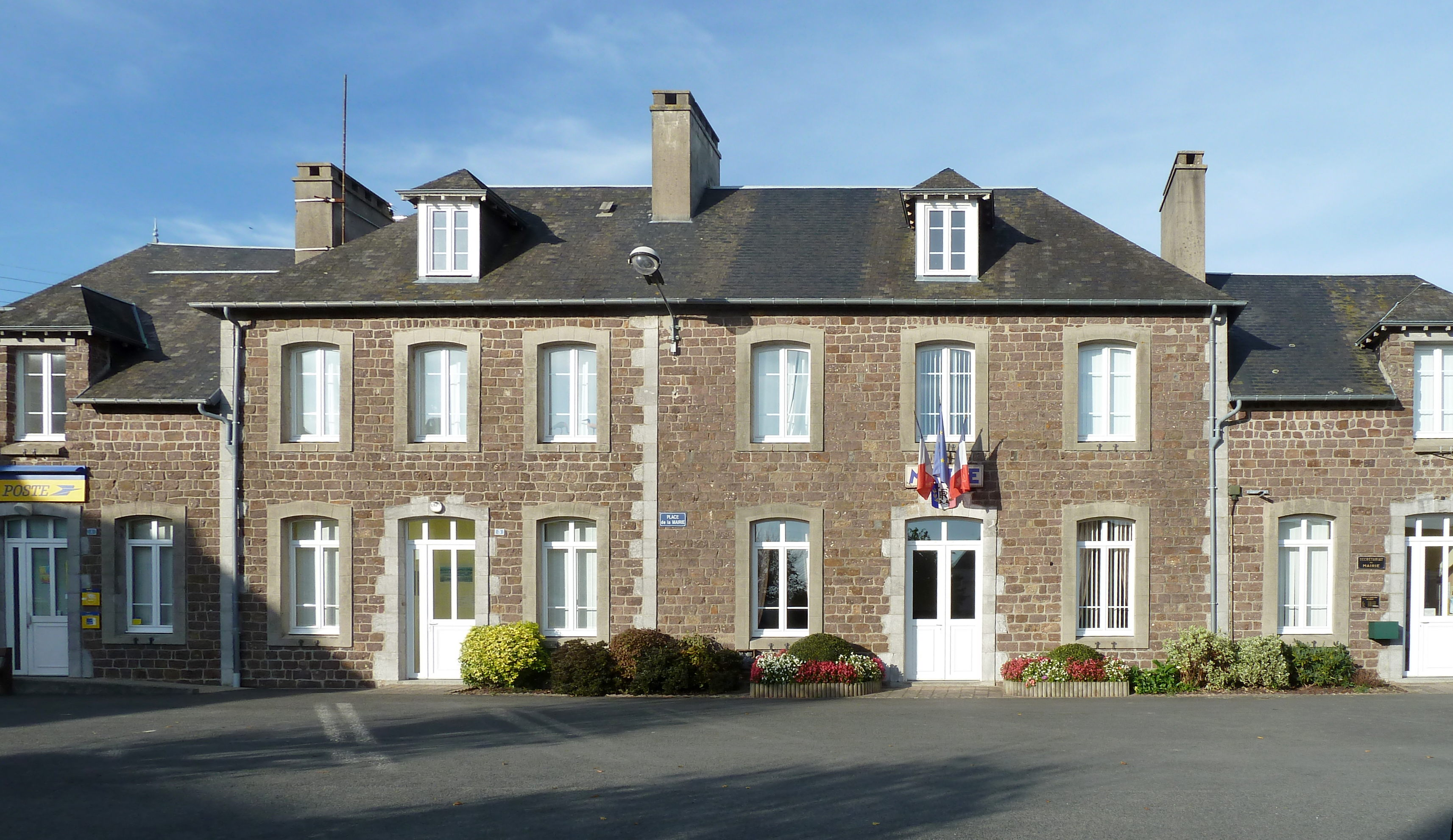 Mairie de Roncey (Manche, France)